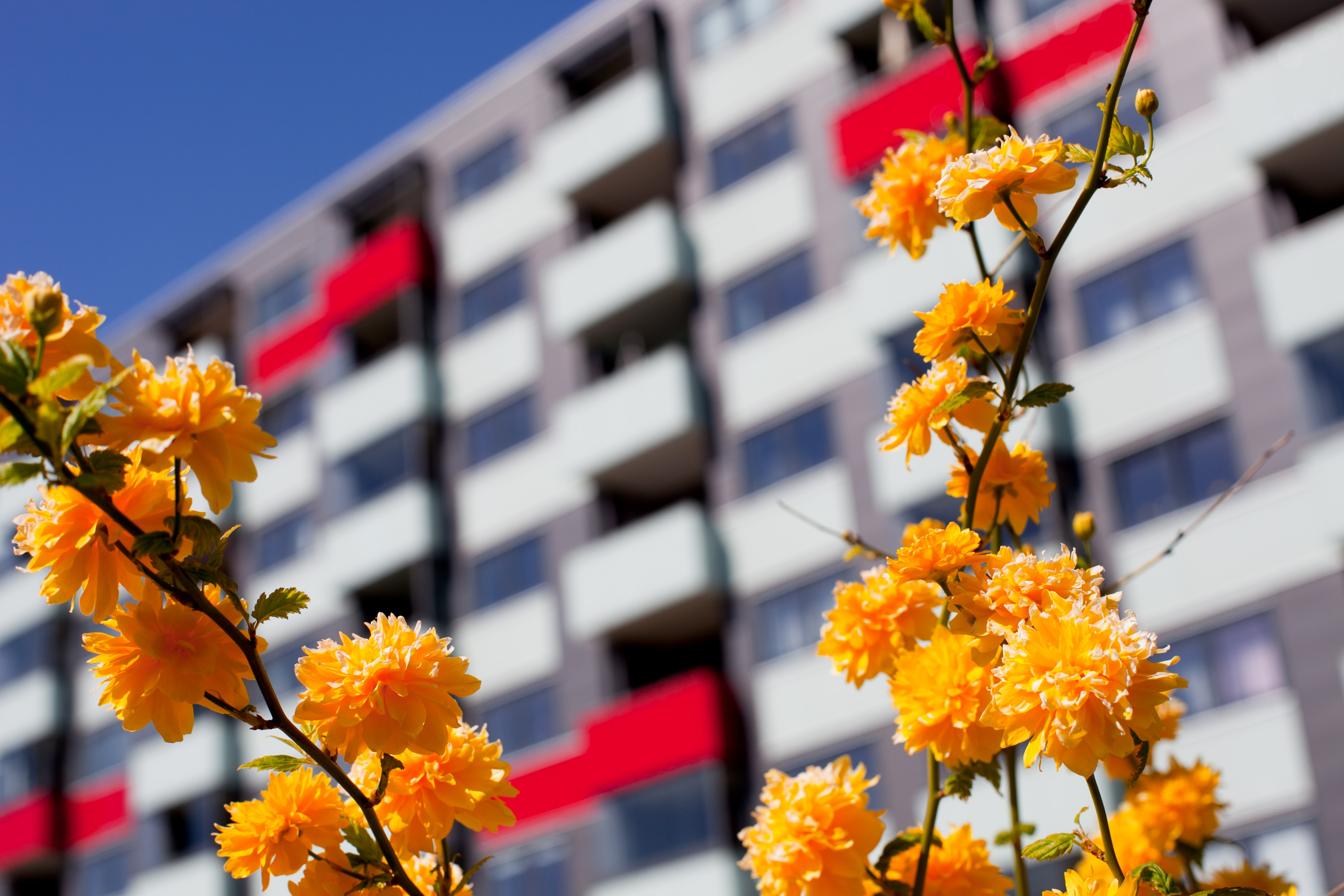 Urbanplanen